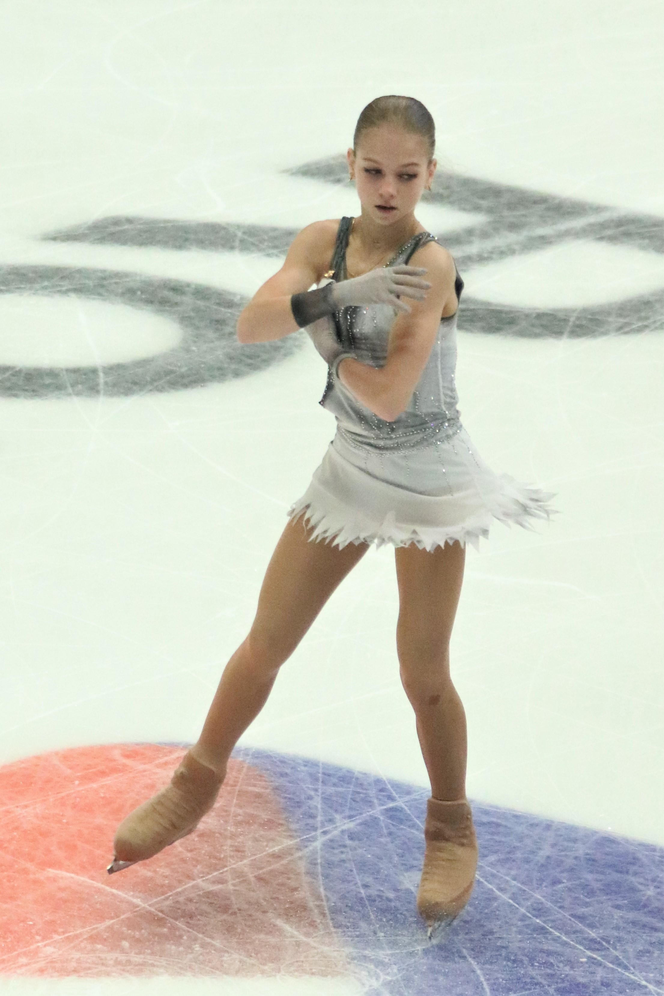 Александра Трусова (Россия) на Rostelecom Cup 2019